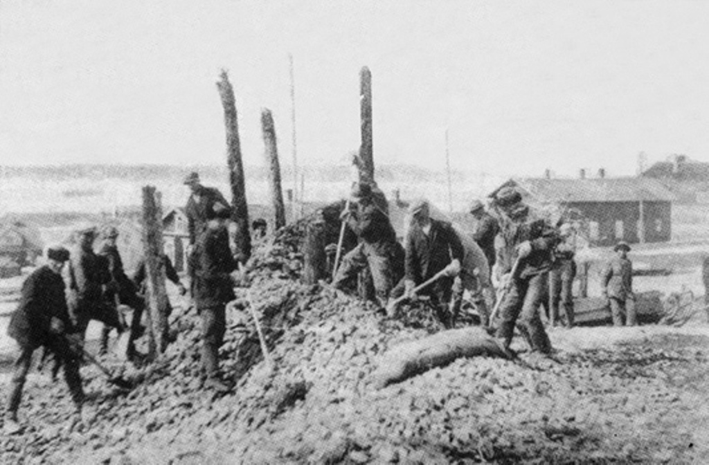 Heikki Tenhamo